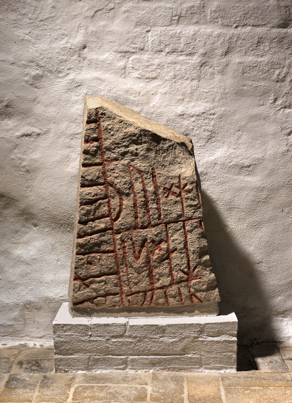 Foto: nationalmuseet ved Roberto Fortuna